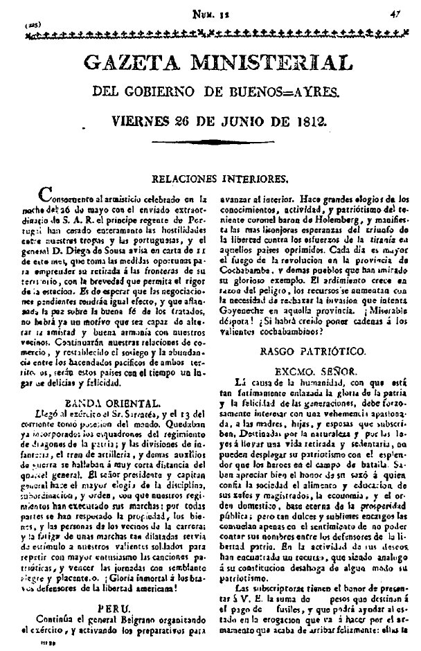 Gazeta Ministerial del 26 de junio de 1812. Suscripción de las Patricias Argentinas.